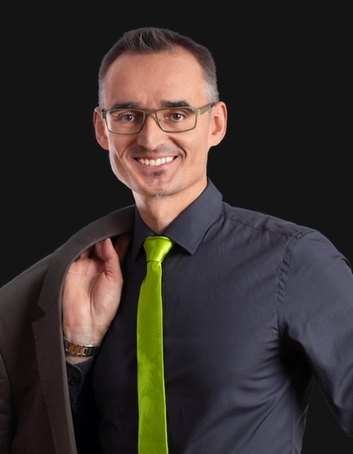 Foto Roland Wegner Wiki